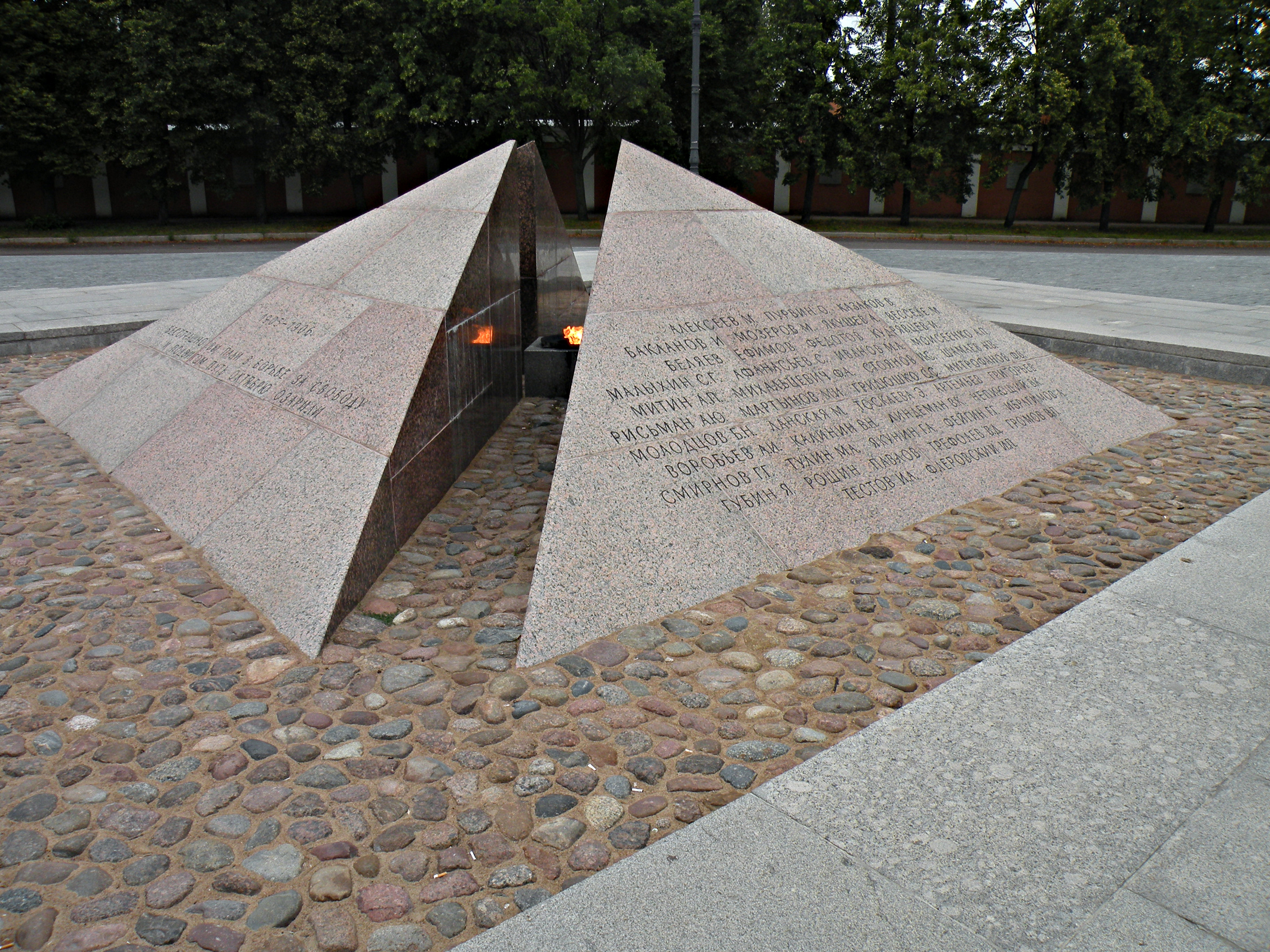 Вечный огонь